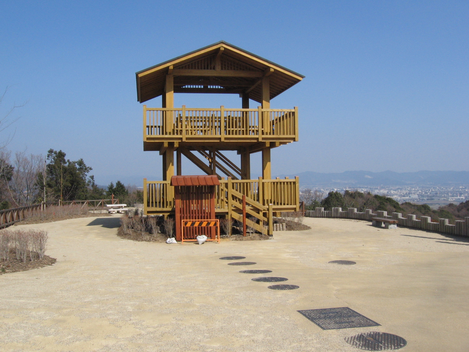 東三河ふるさと公園の展望台